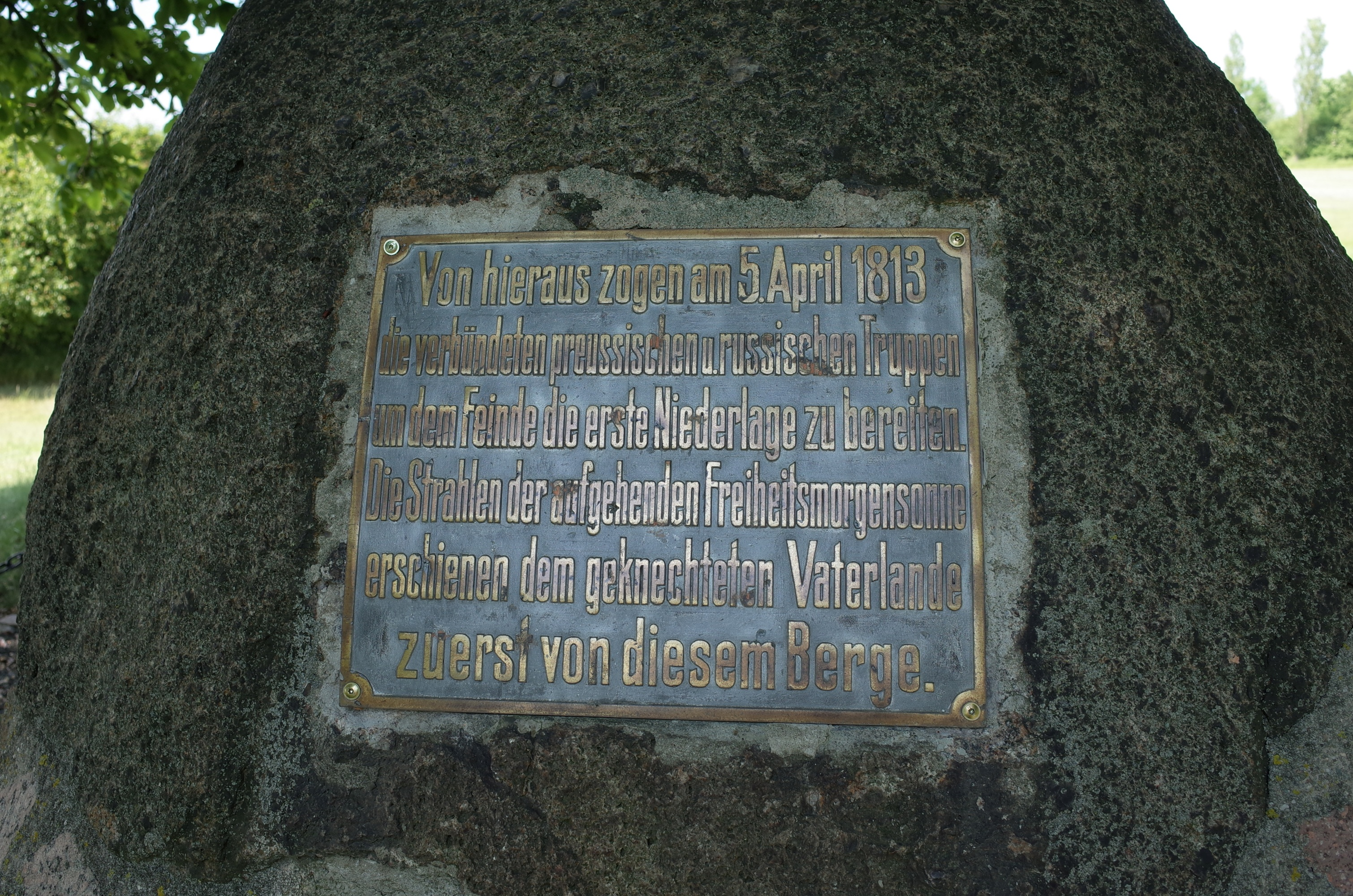 gommern, Ortsteil Ladeburg. Innschrift auf dem Gedenkstein zur Erinnerung an den 5. April 1813.